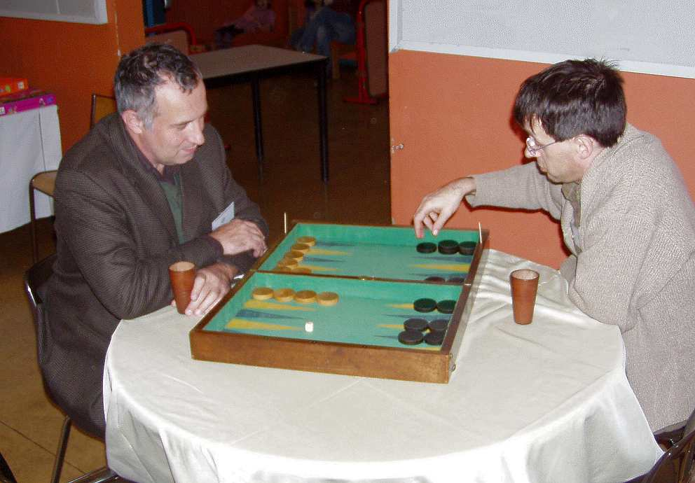 Une partie de trictrac à Lyon, le 25 novembre 2006, entre M. Denis Reynaud à gauche et M. Laurent Thirouin à droite, deux historiens travaillant à l'université Lyon II.